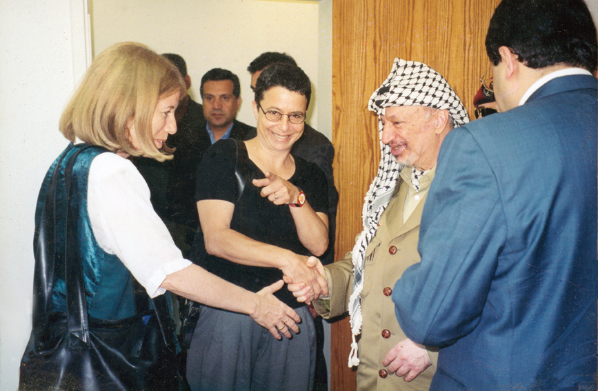 פגישה של פעילי שמאל ישראליים עם יאסר ערפאת, בלשכתו ברמאללה בשנת 1999